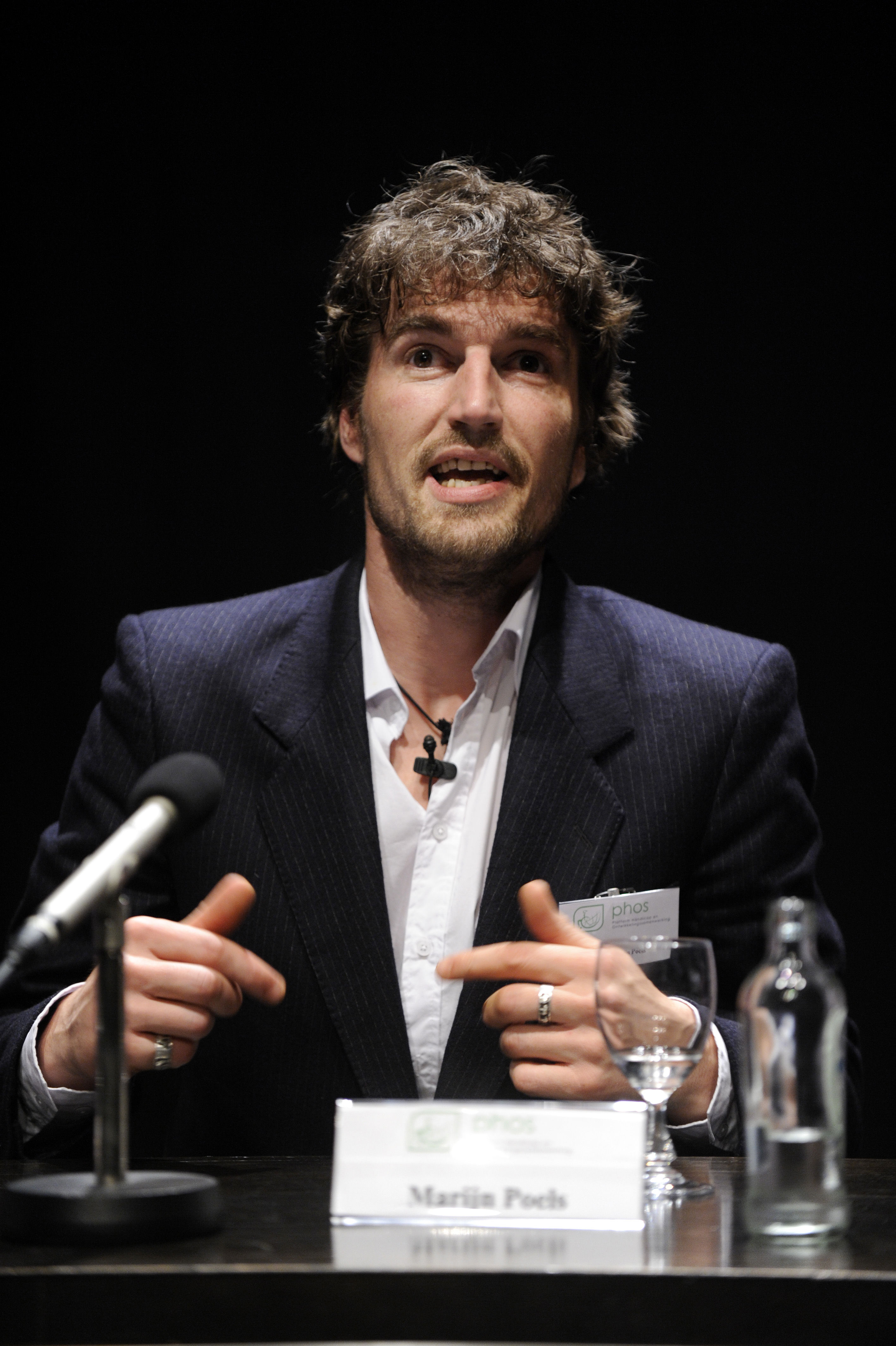 Filmmaker Marijn Poels